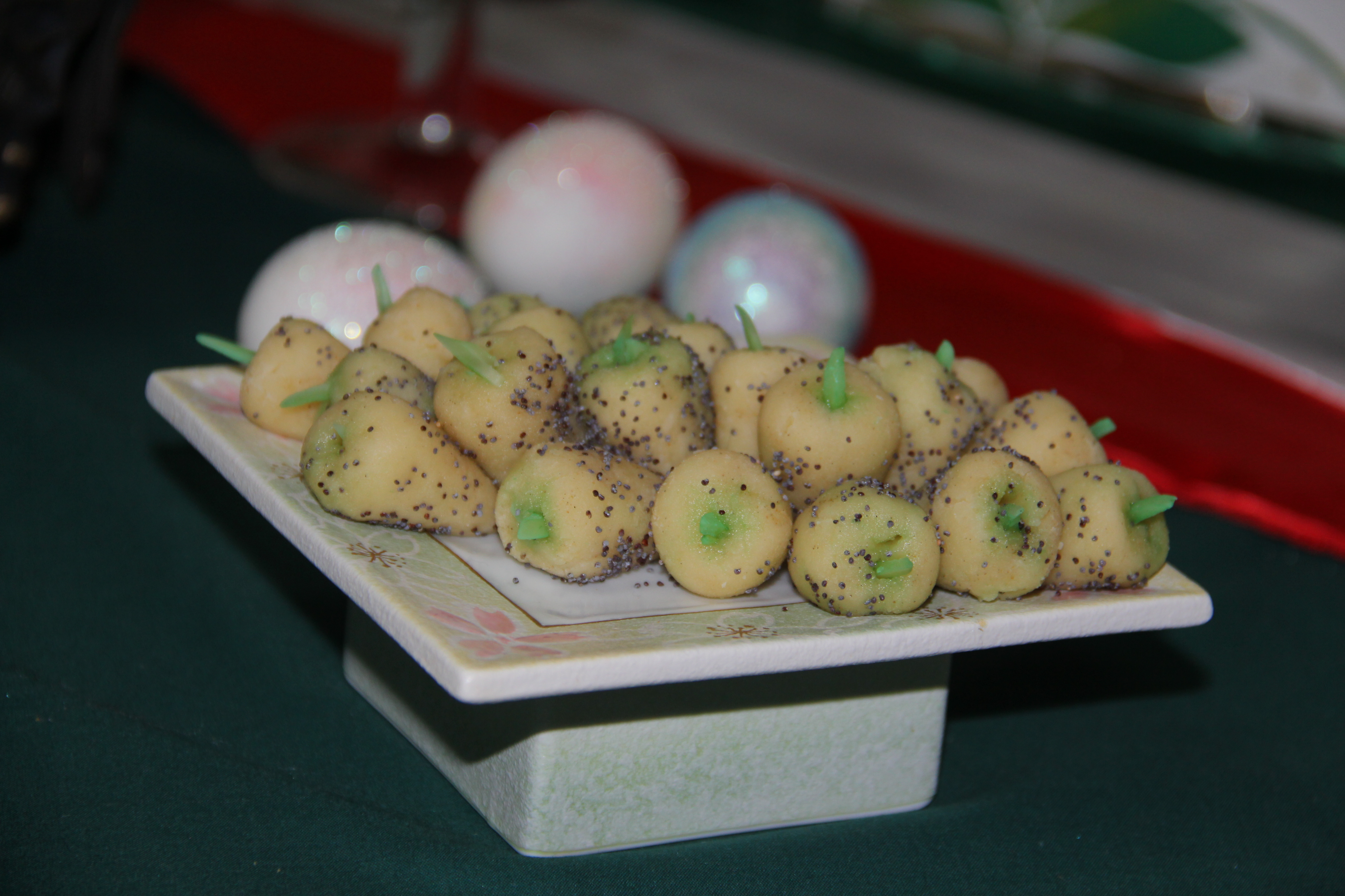 شیرینی توت